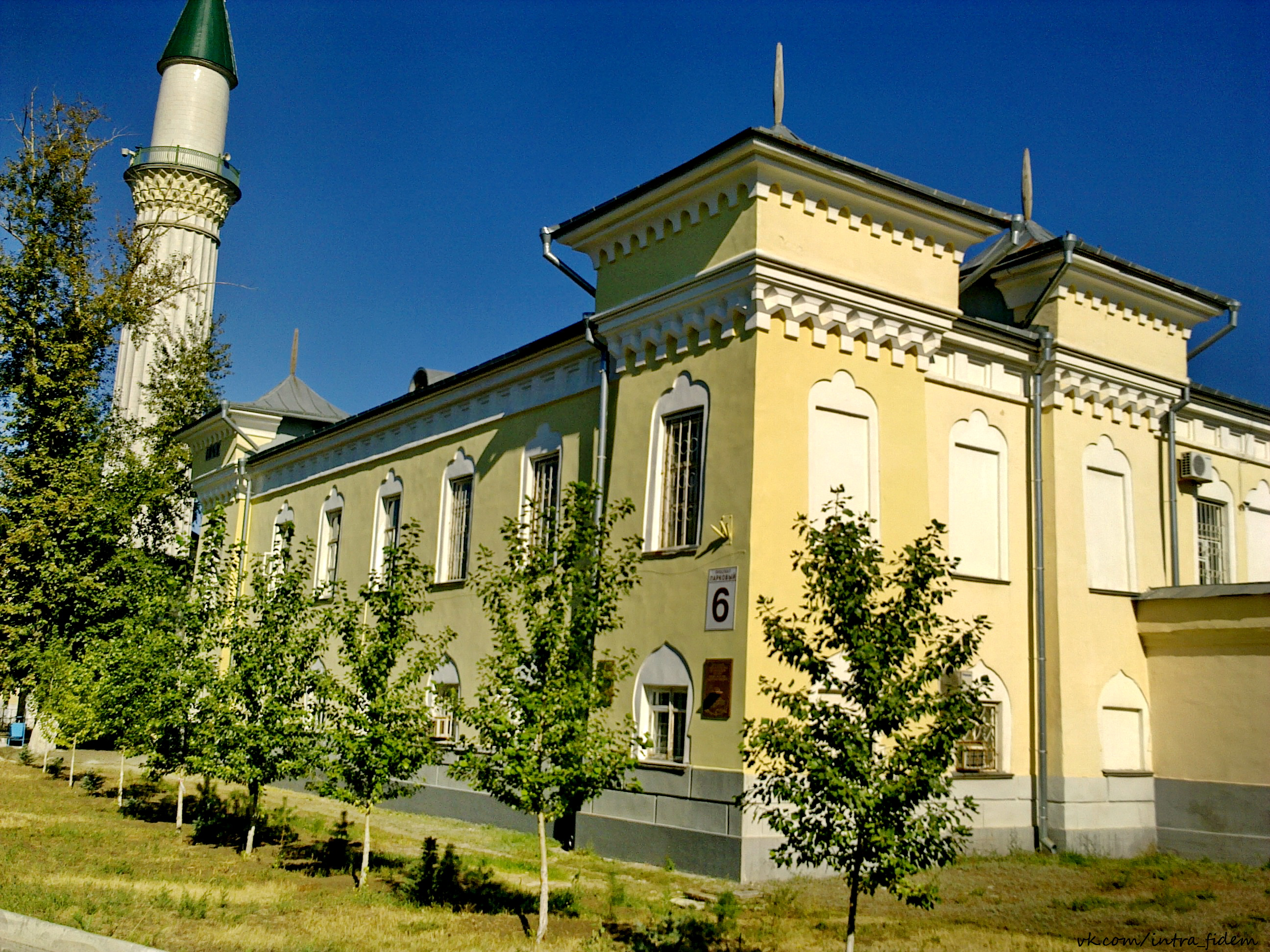 Мечеть с минаретом (Оренбургская область, Оренбург, Парковый пр., 6)